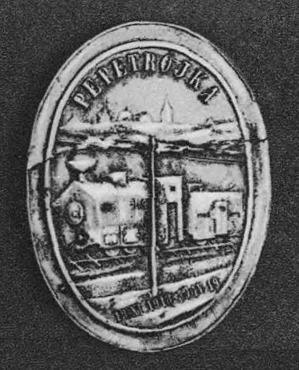 Odznaka Pociąg Pancerny Pepetrójka